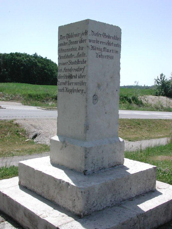 Limesstein